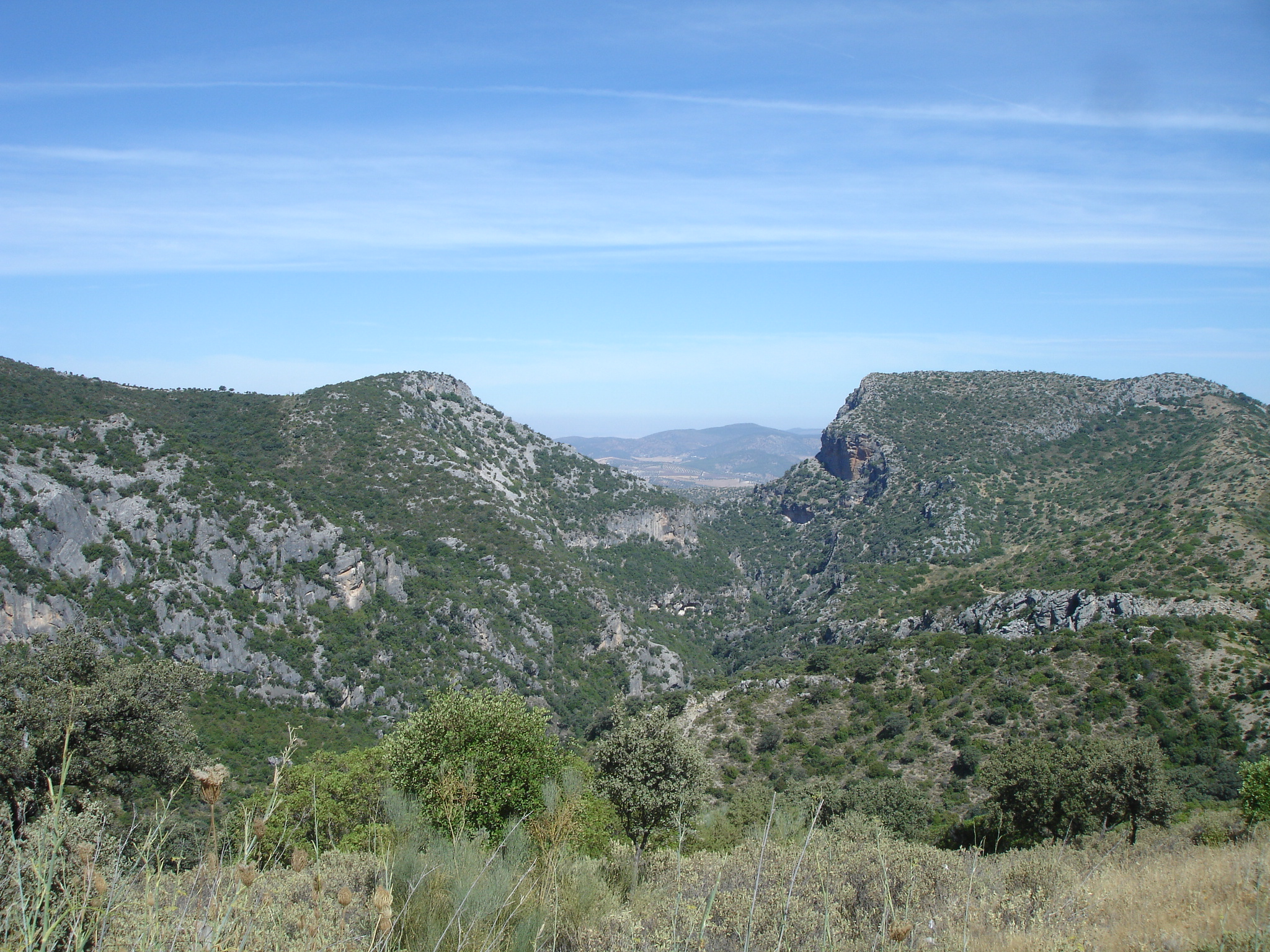 Garganta Verde (Grazalema, SPAIN)